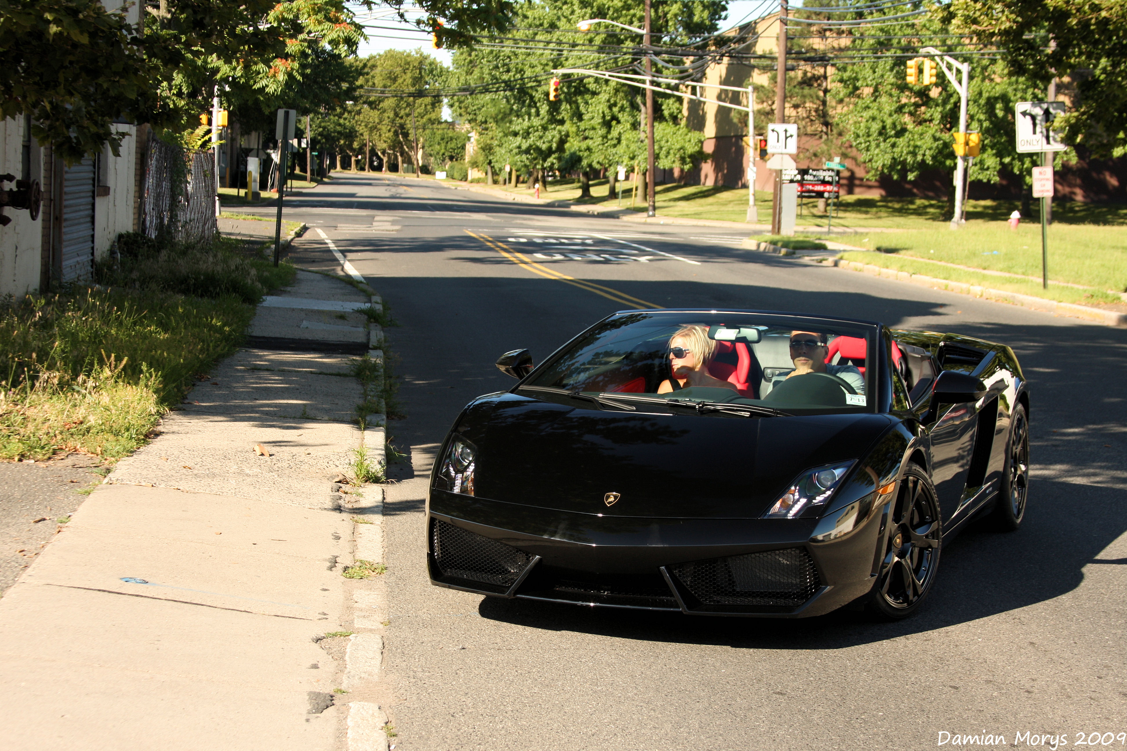 Brand new black over red LP560-4 Spyder.